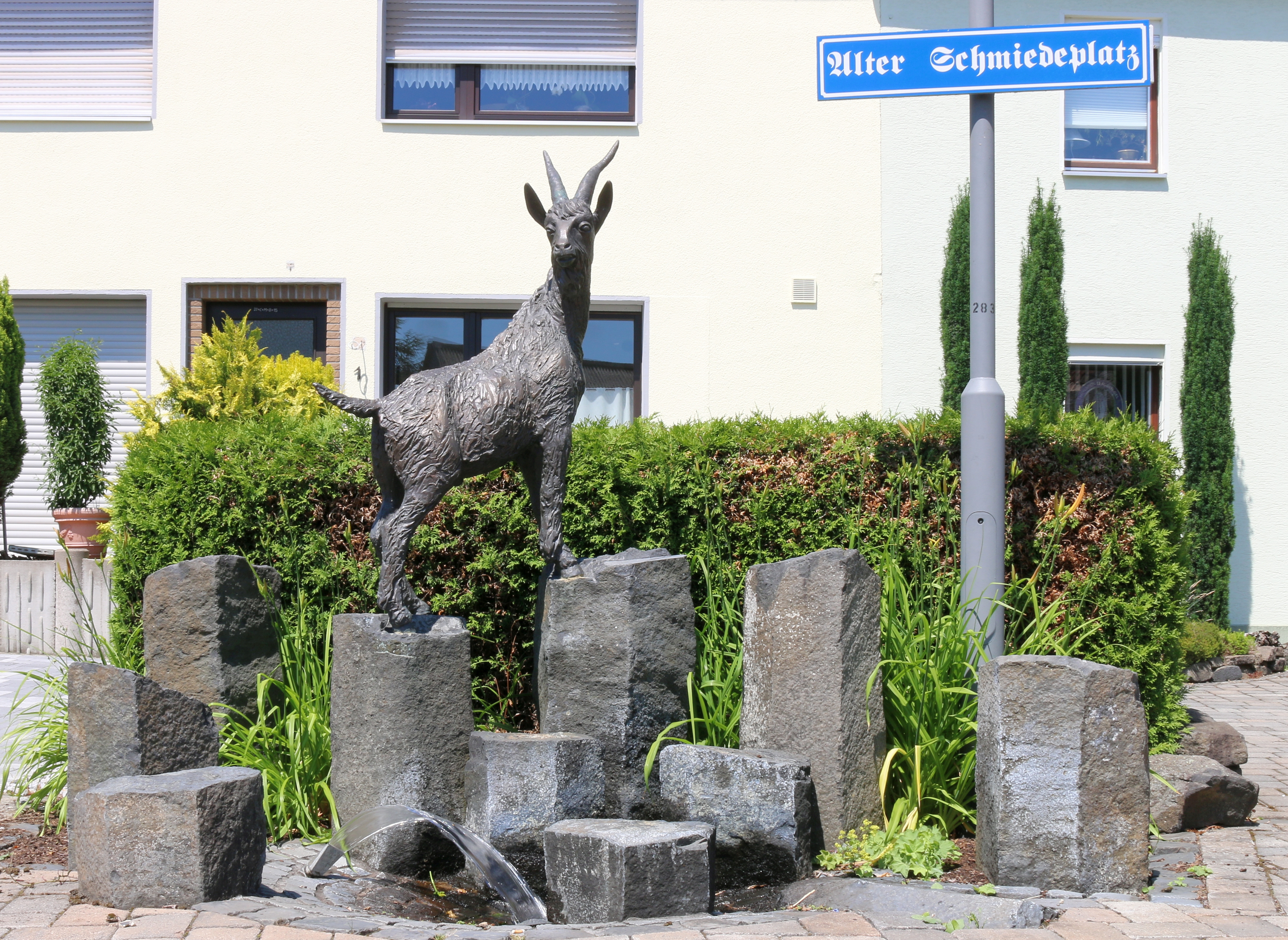 Langendernbach, Westerwald: Alter Schmiedeplatz